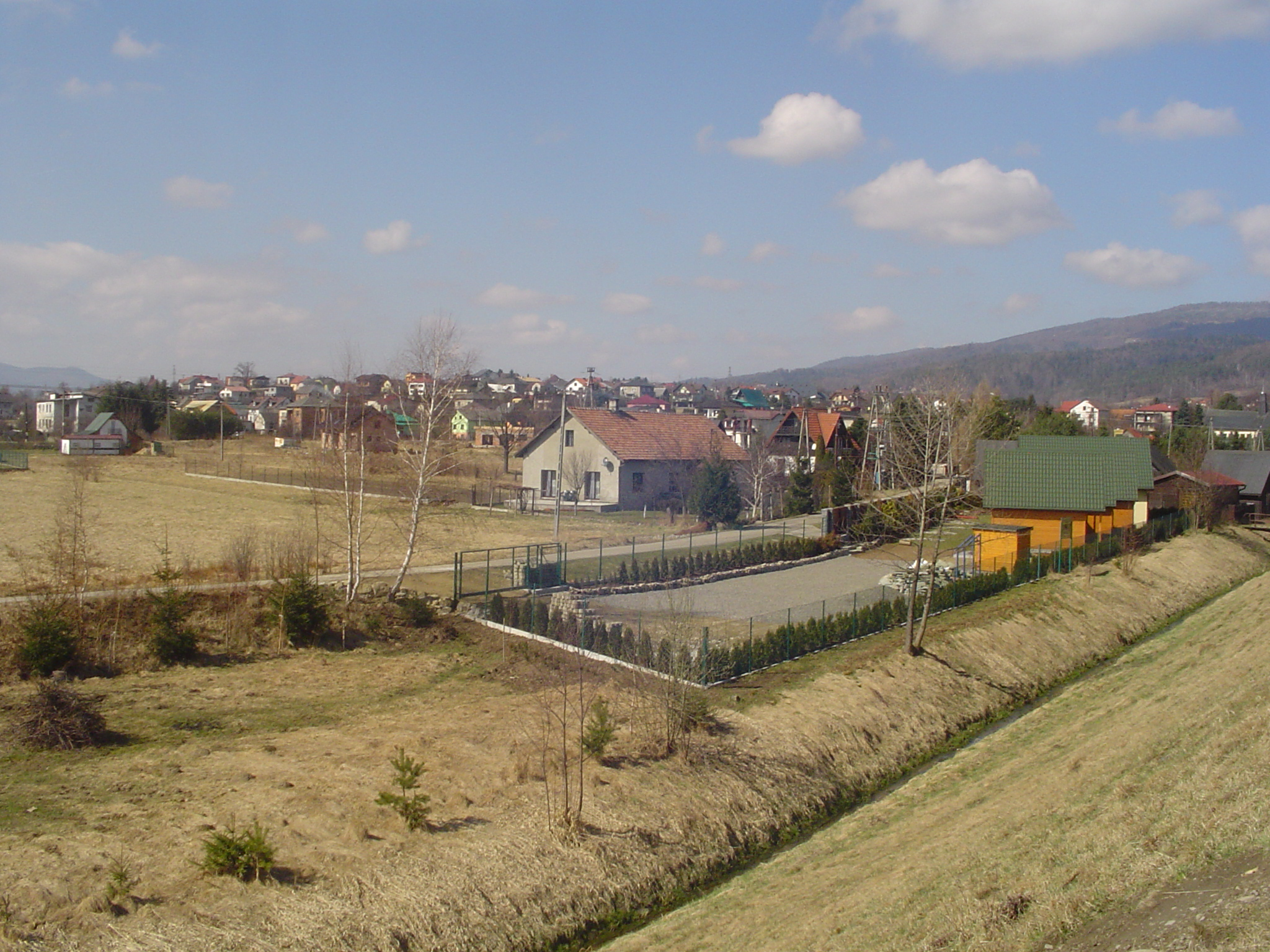 Wieś Zarzecze koło Żywca - widok z wałów otaczających Jezioro Żywieckie